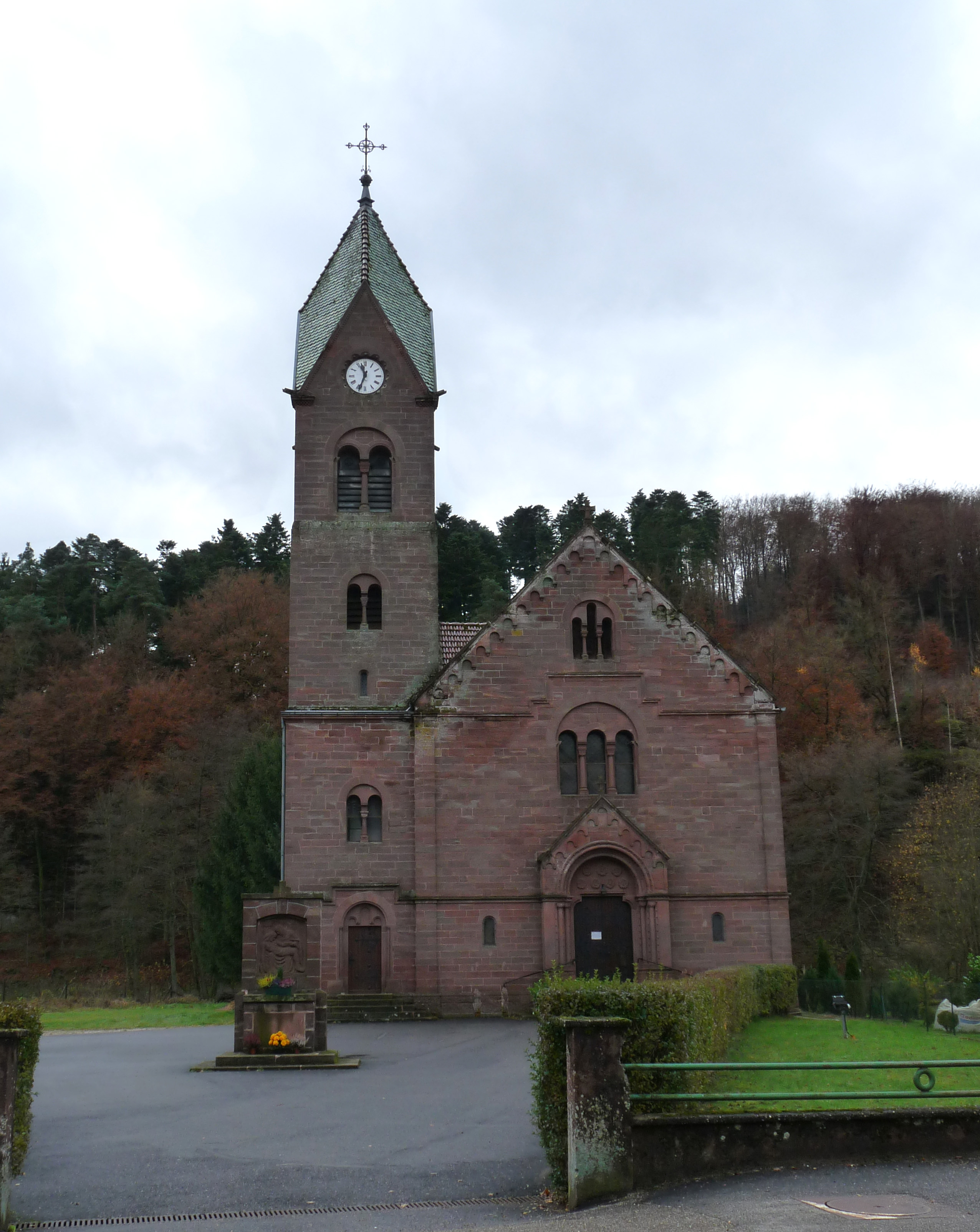 Eglise de Graufthal (commune d'Eschbourg, Bas-Rhin)